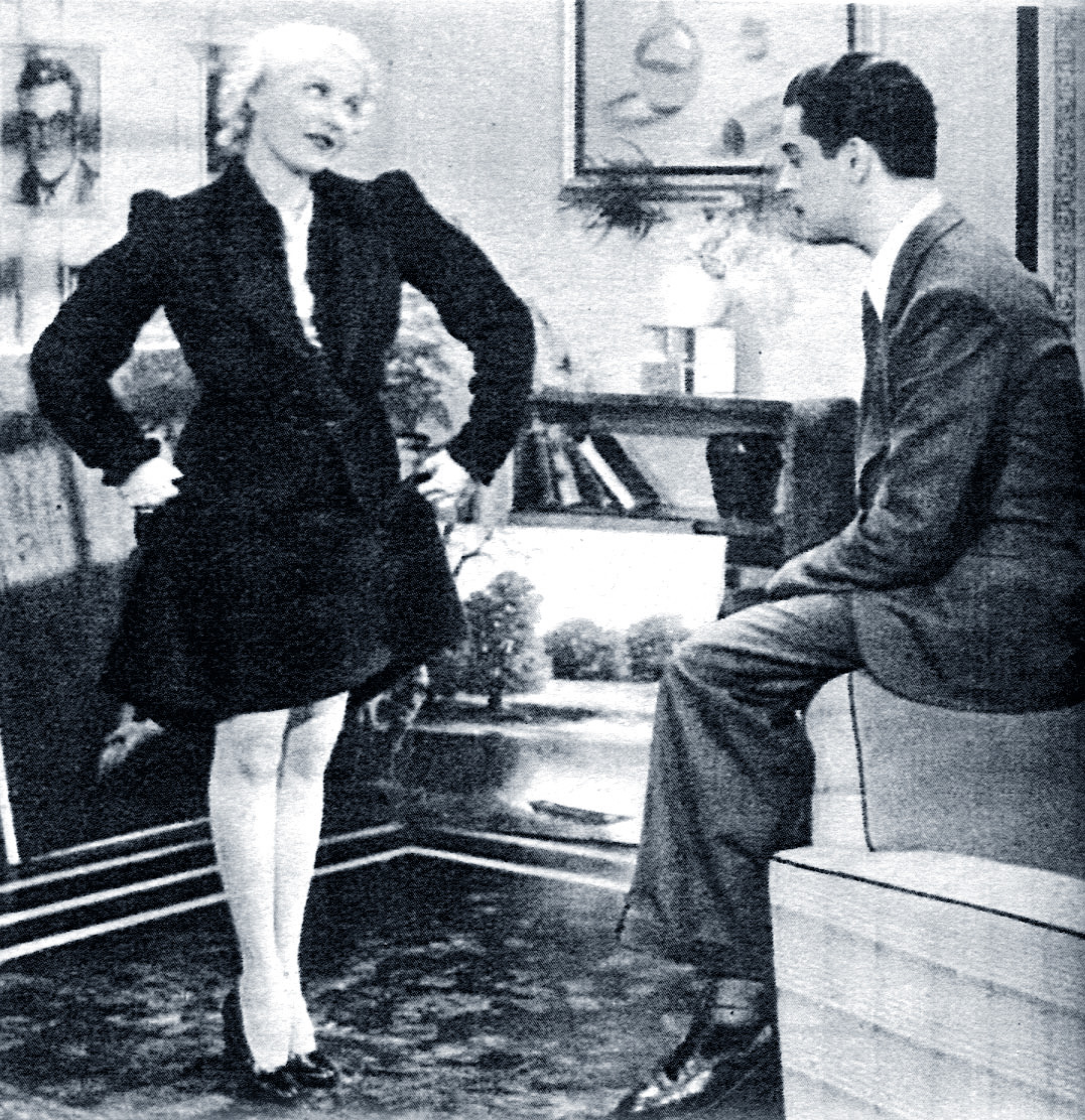 Clara Tabody e Mario Pisu in una scena del film "E' tornato Carnevale" (Matarazzo, 1937)